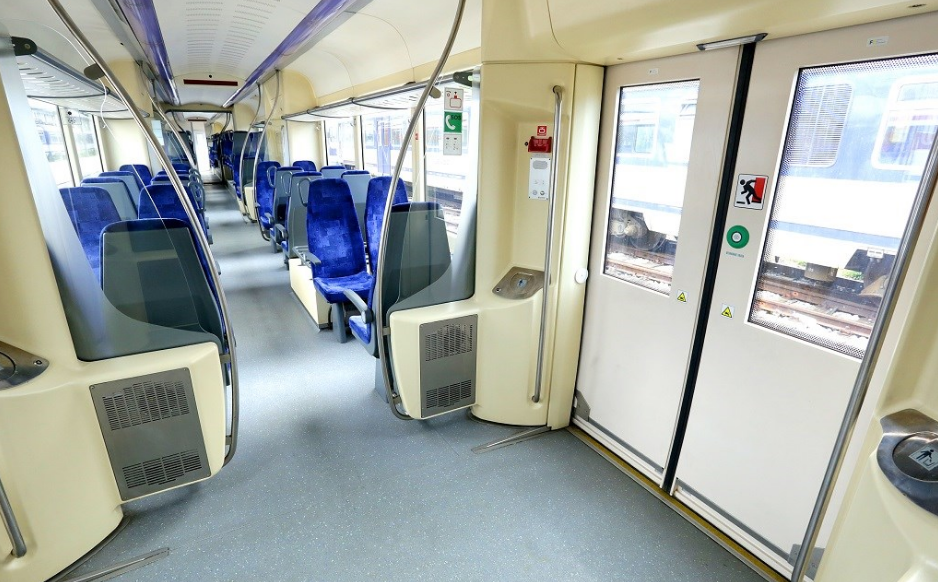 Interijer